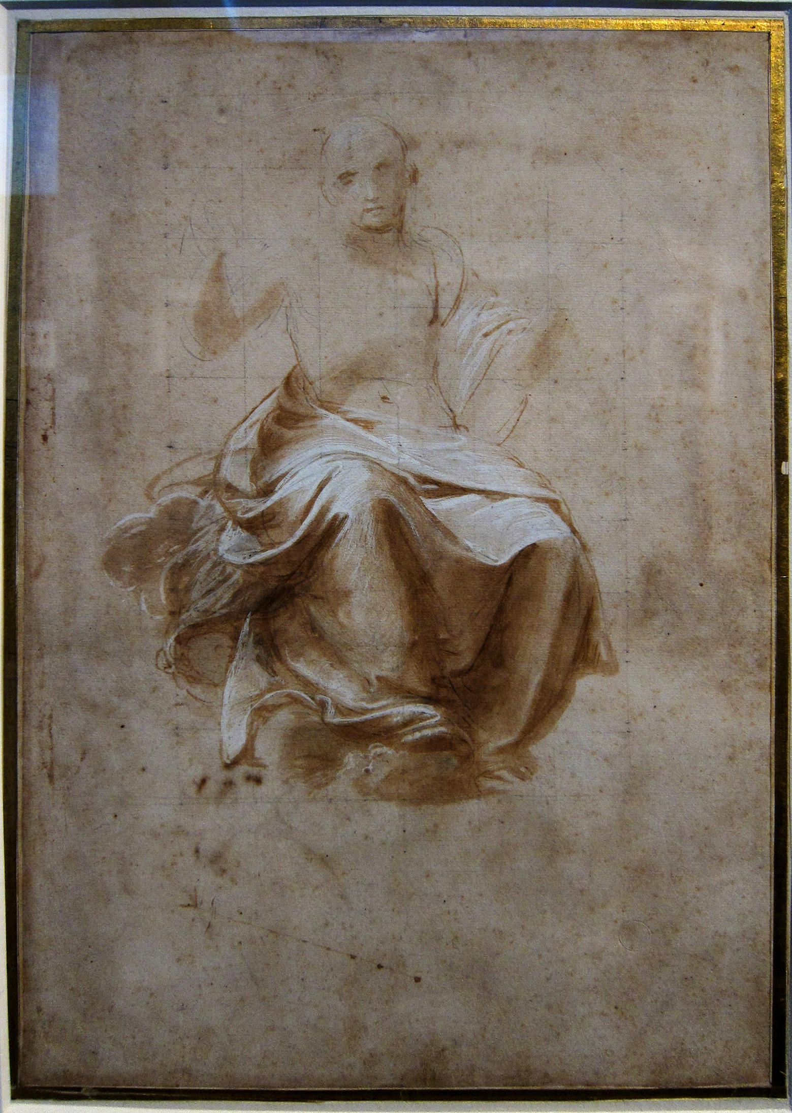 Homme drapé assis au Palais des beaux-arts de Lille.